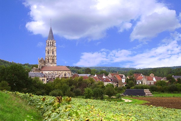 Village de Saint-Père sous Vézelay (Yonne)